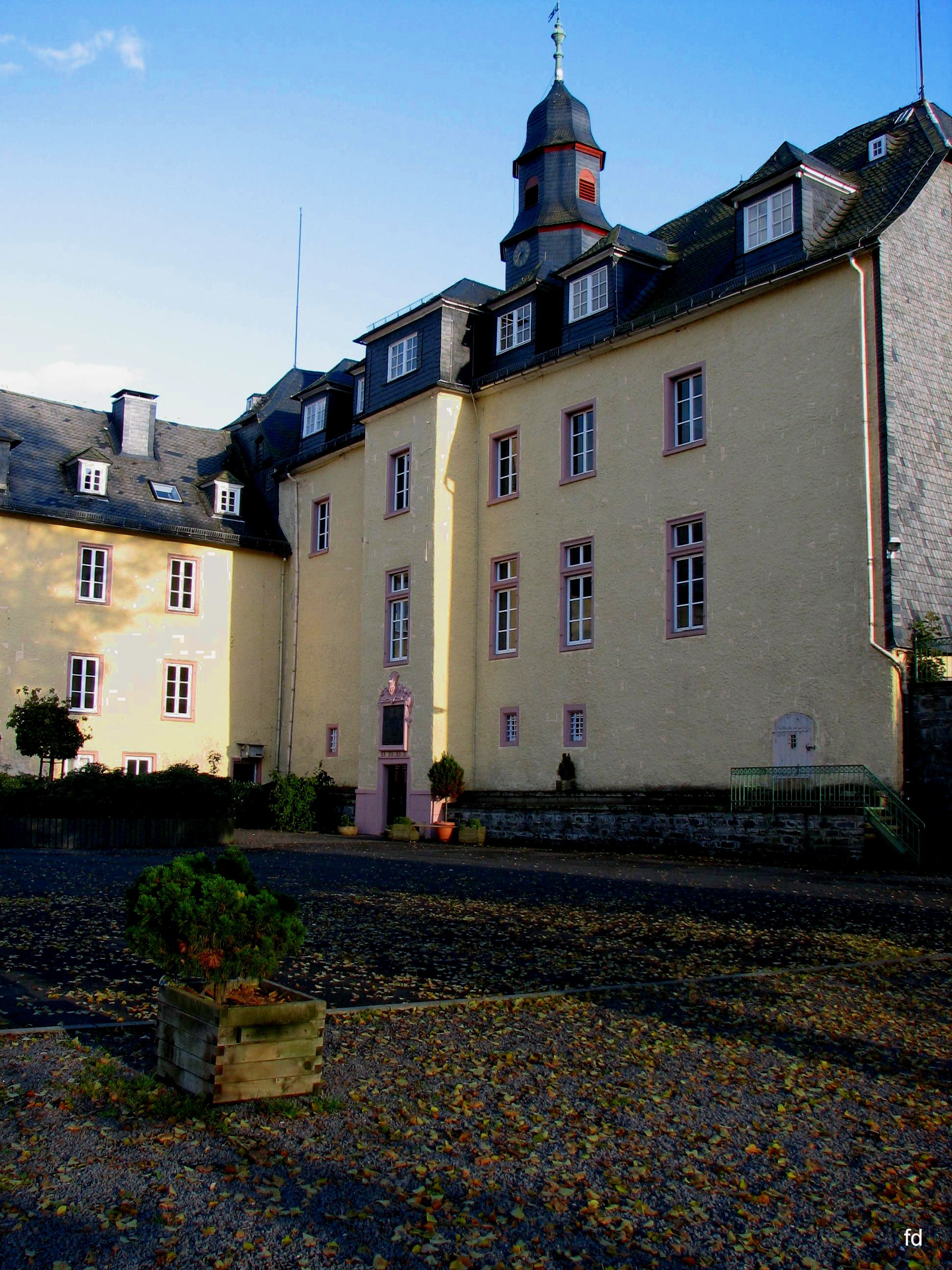 Schloss Witgenstein Bad LaaspheThis is a photograph of an architectural monument., no. Bad Laasphe 2